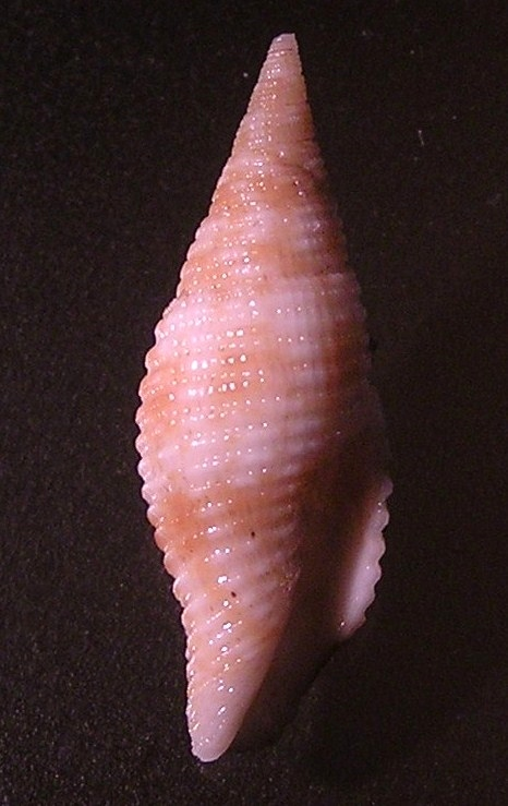 Cancilla armonica Tiziano Cossignani & Vincenzo Cossignani, 2006 a sea snail from the family Mitridae; Philippines